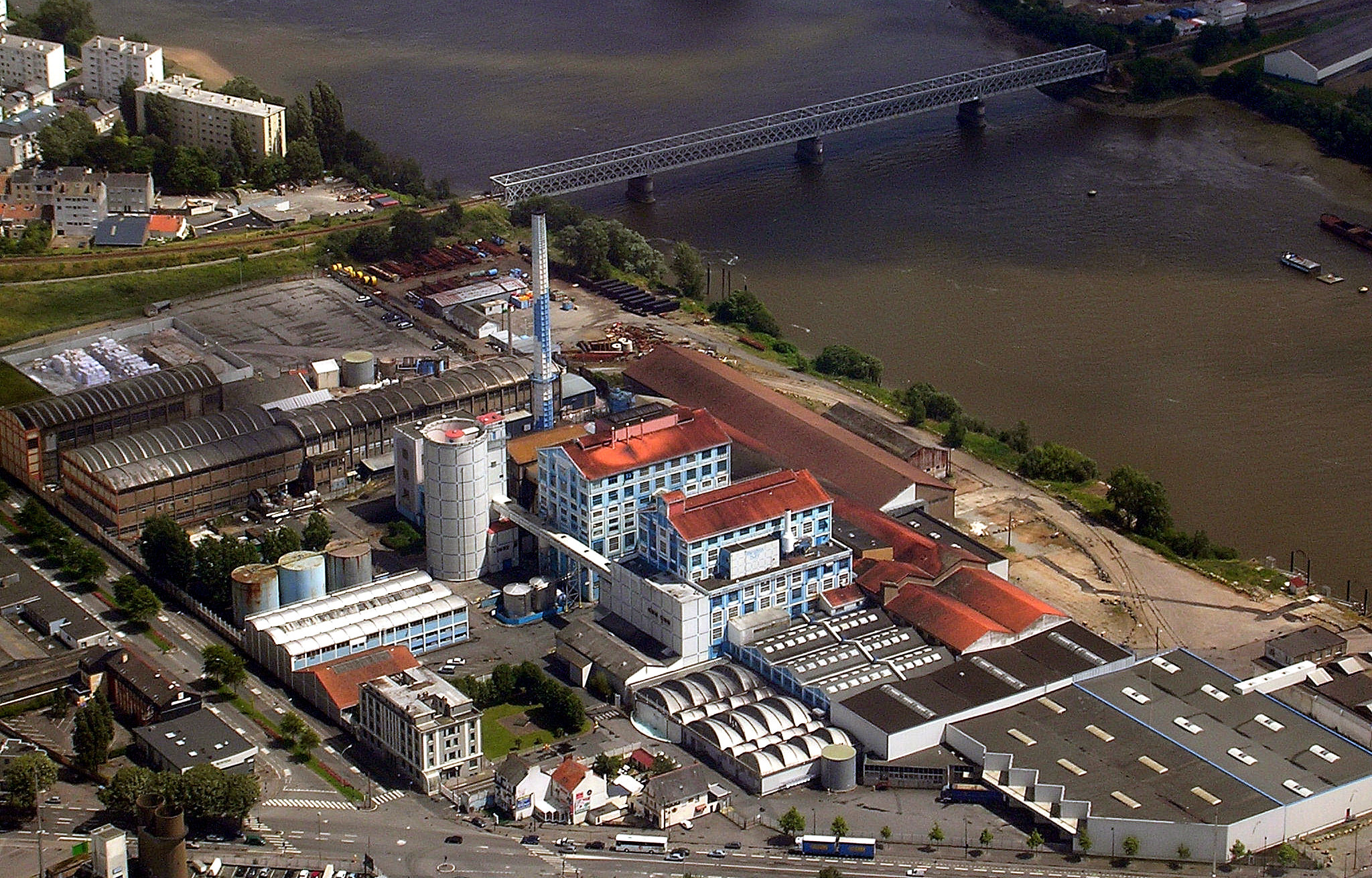 Raffinerie Tereos (ex-Beghin-Say) à Nantes vue d'avion